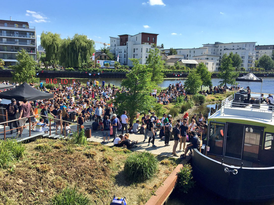 Jardin Confluence à Rennes lors du festival Big Love (juin 2017). Photo publiée avec l'autorisation de l'auteur : Vincent Maho-Duhamel.